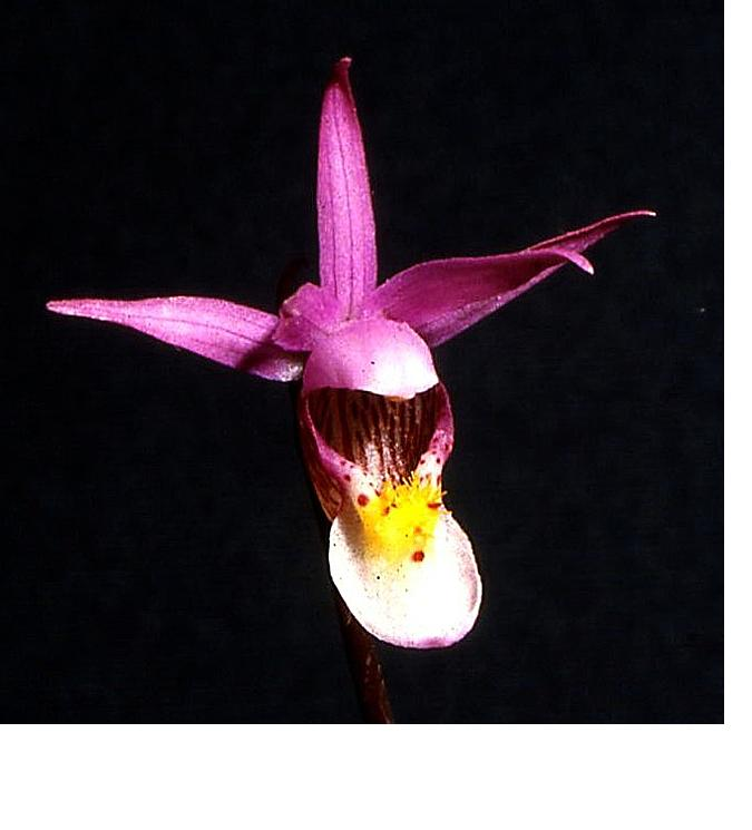 Calypso bulbosa